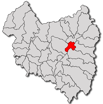 Categorie:Hărţi ale judeţului Covasna